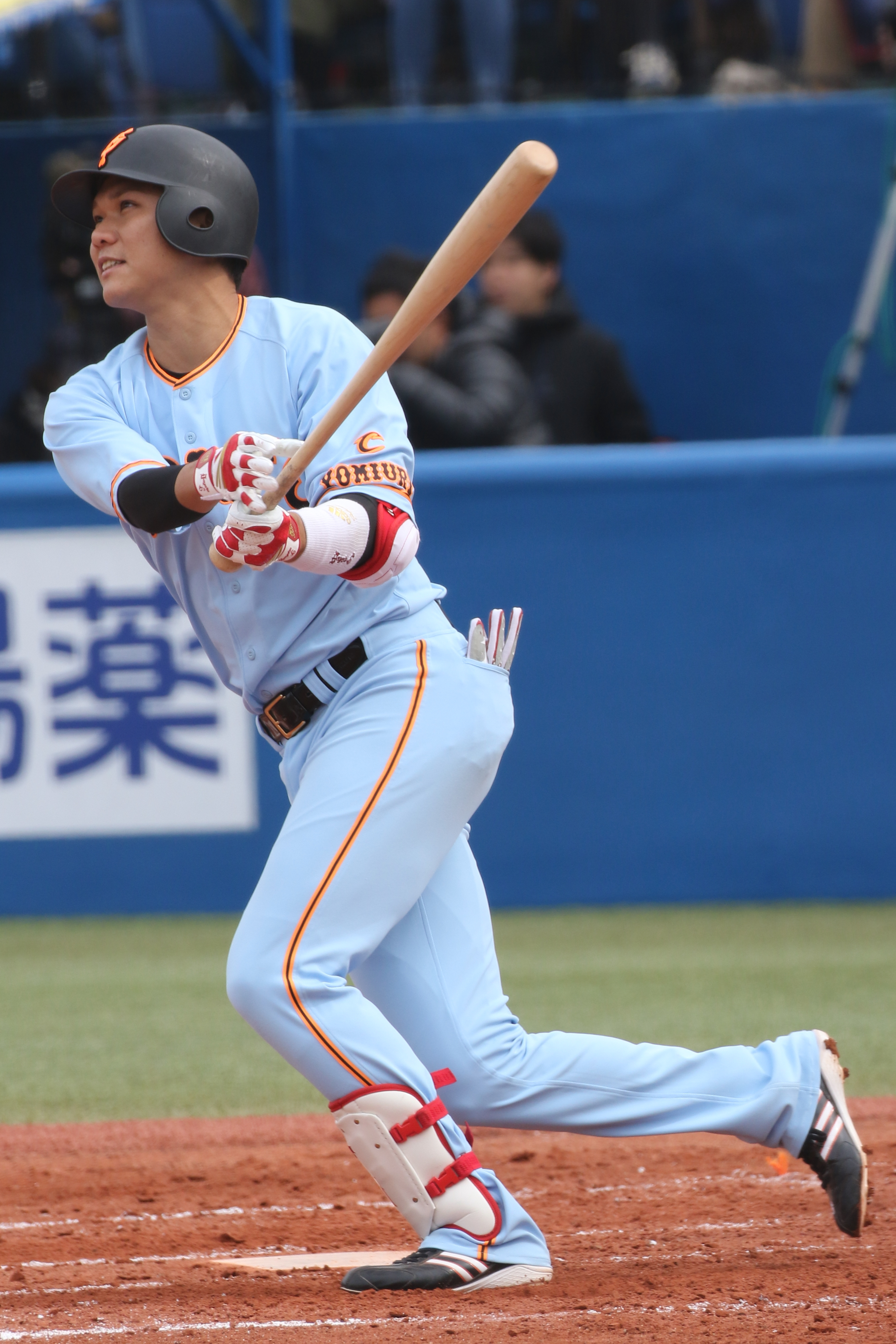 ジャイアンツ坂本勇人選手